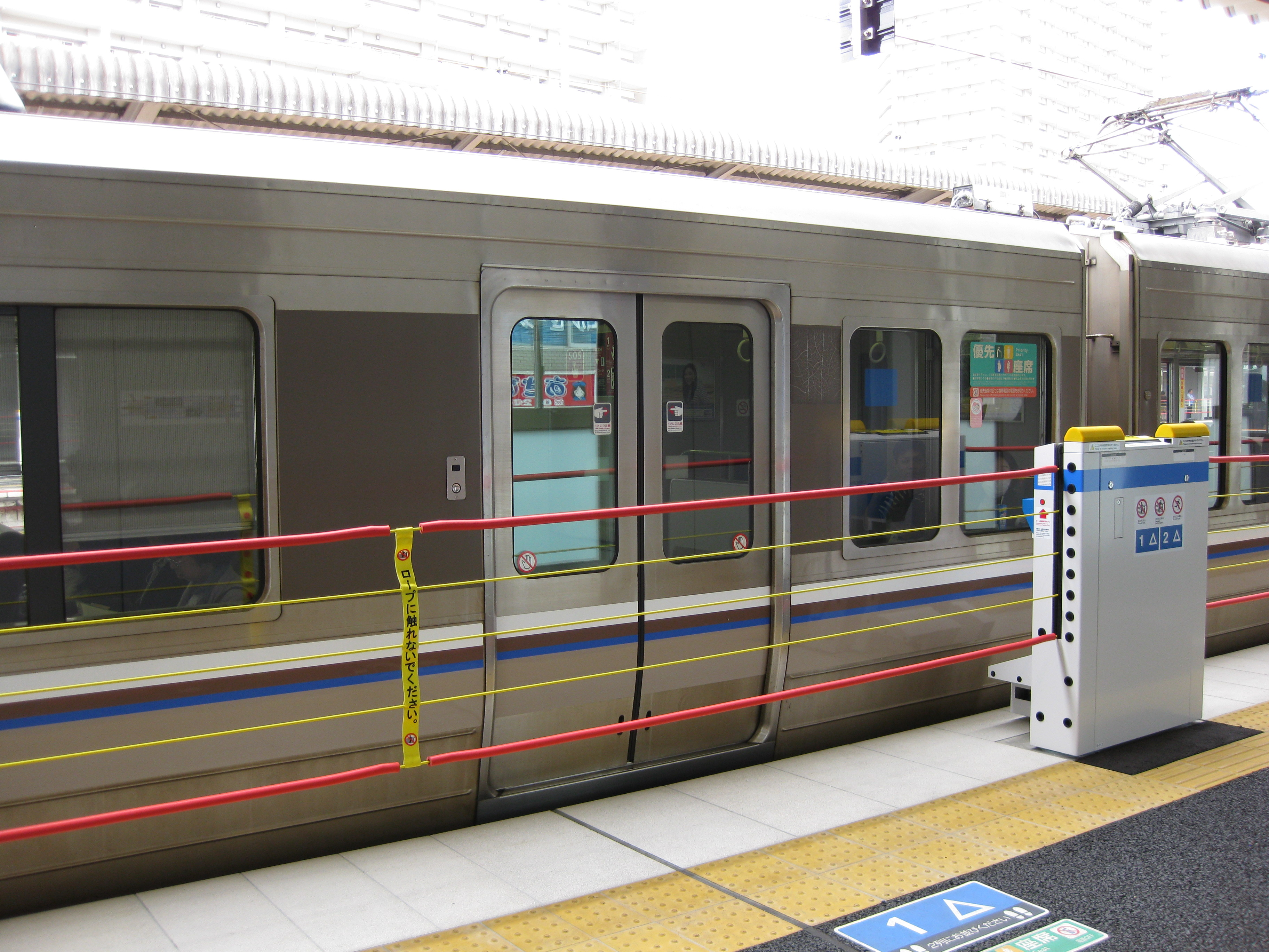 高槻駅新快速用プラットホームのホームドアが閉まった状態